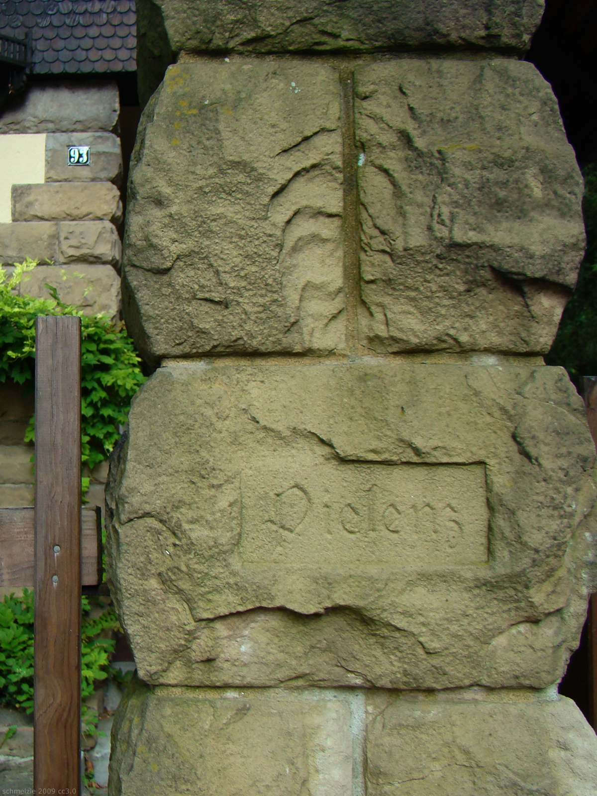 Namensinschrift am Gartenpfosten der Villa Pielenz in Heilbronn